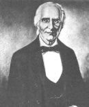 Retrato del siglo XIX del ex presidente dominicano Ulises Espaillat.